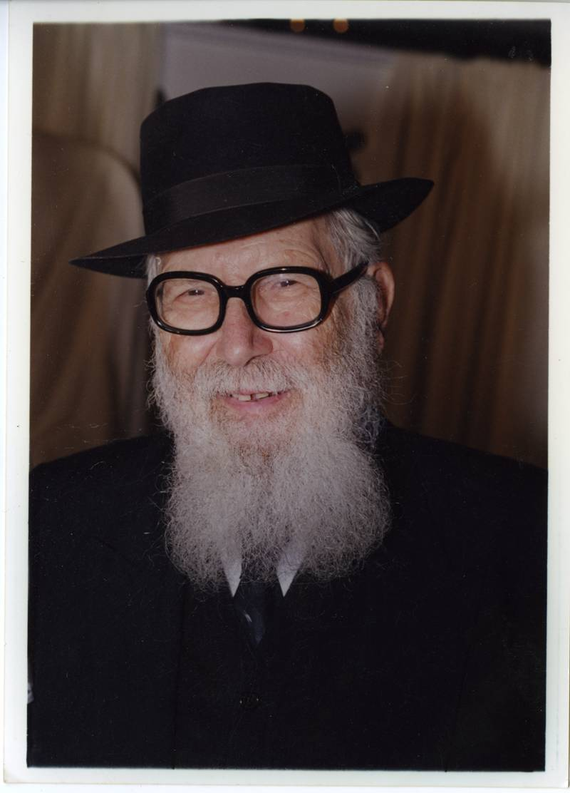 הרב בנימין צביאלי. התמונה צולמה באמצע שנות ה70 שלו, איפשהוא בראשית שנות ה90 של המאה שעברה.